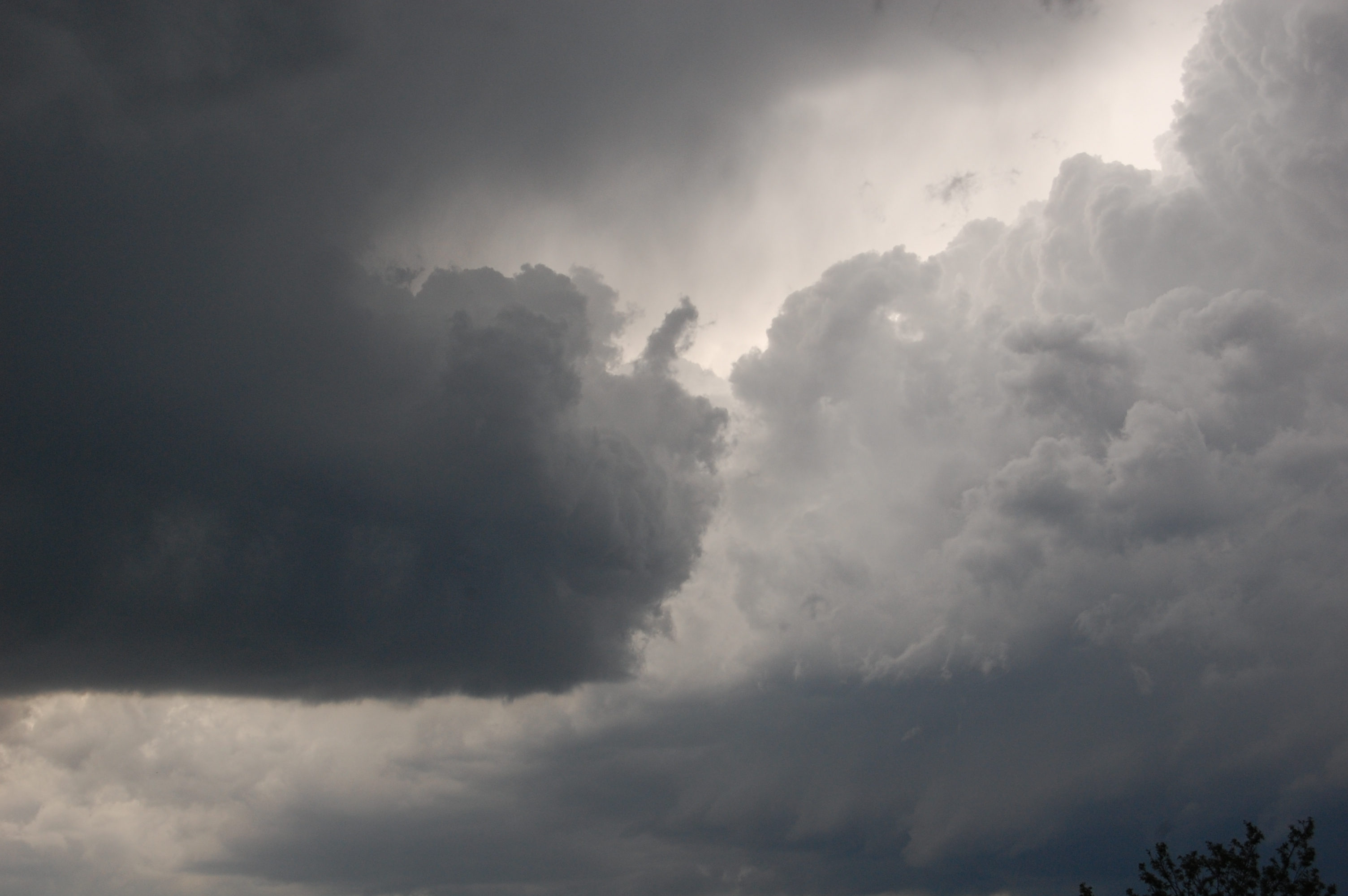 Nubes de tormenta